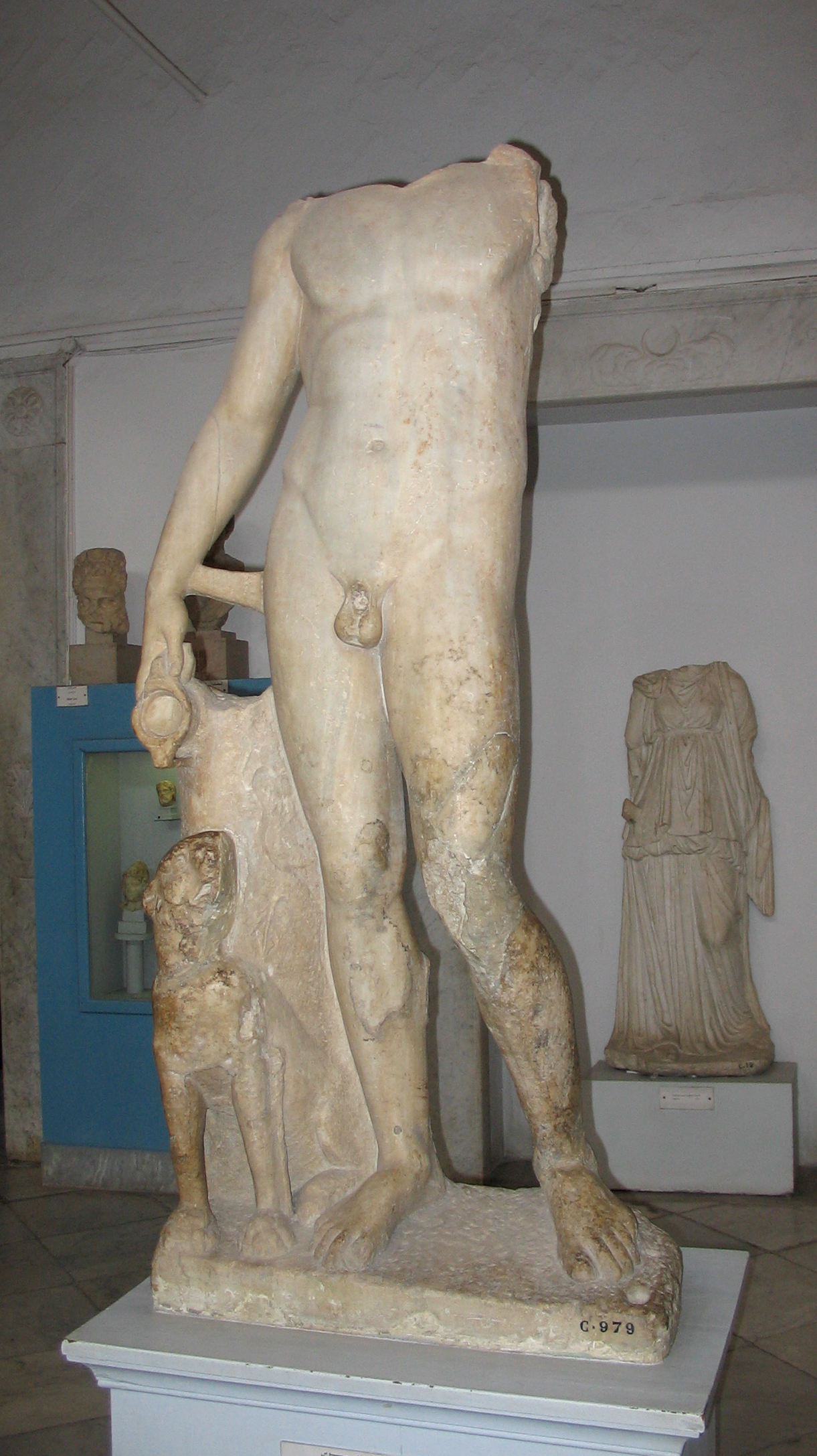 Bacco, scultura romana II sec., ex Museo nazionale del Bardo,Tunisi.